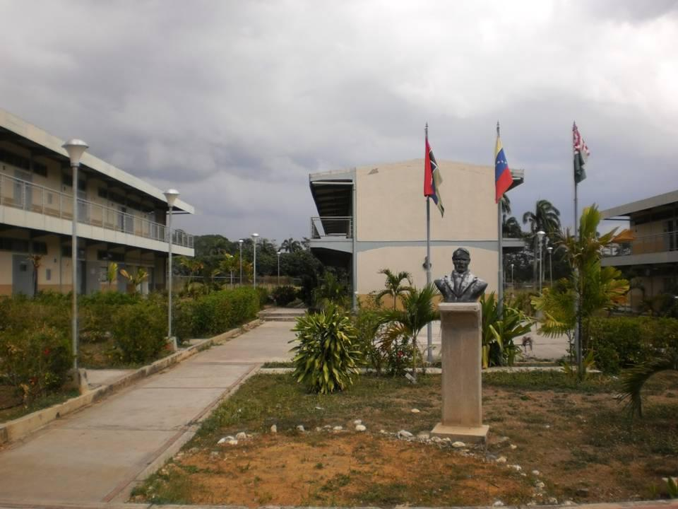 sarare